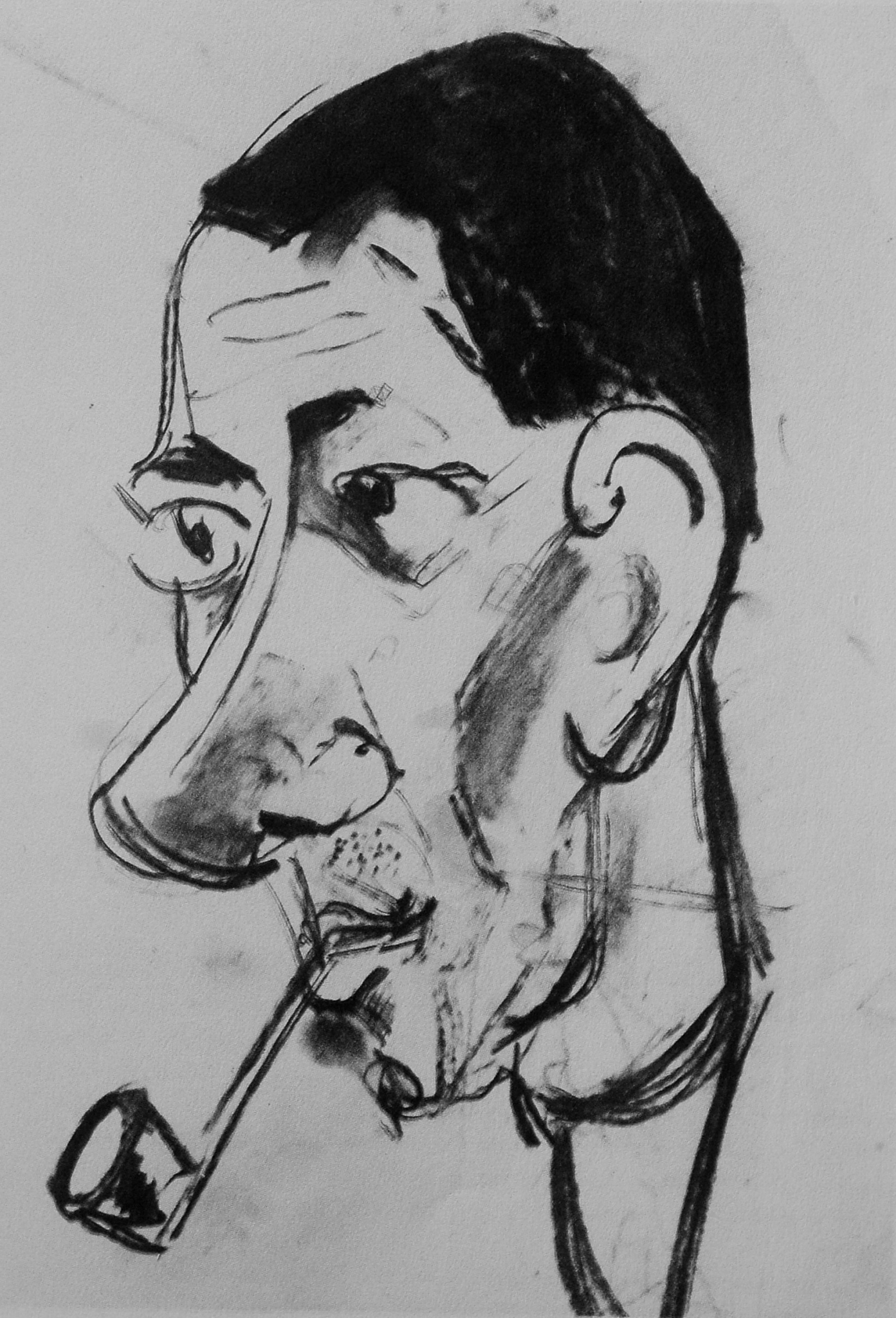 Arthur C:son Percy. Karikatyrteckning av konstnärsvänner utförd av konstnären John Jon-And, utgiven postumt efter hans död 1941 i boken Konstnärer Gebers Förlag.